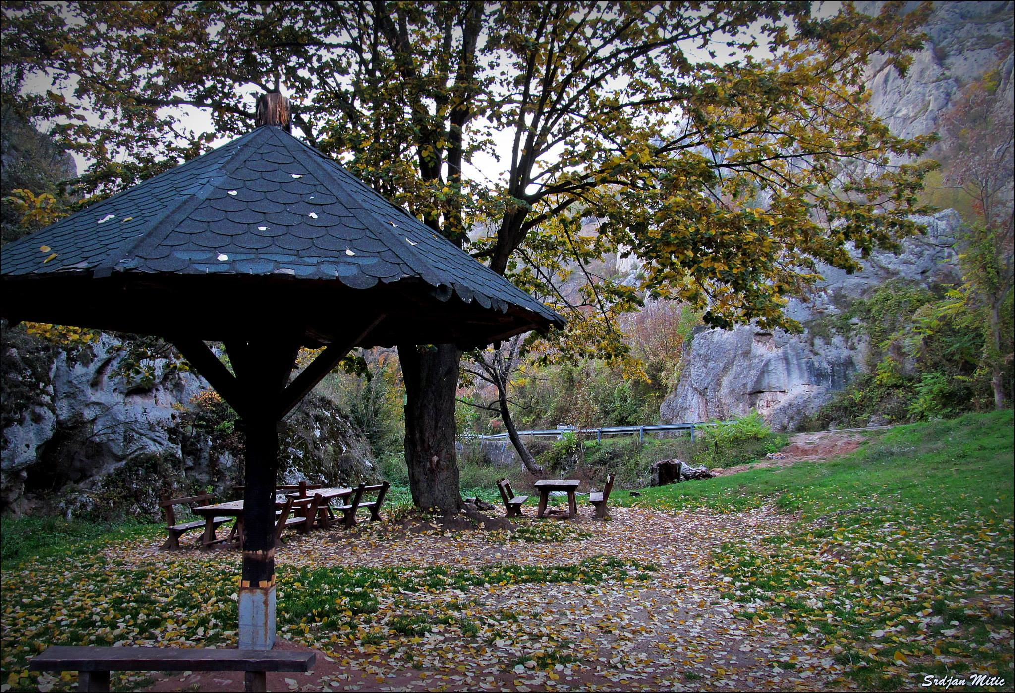 Српски (ћирилица): Излетиште у Јелашничкој клисури, Нишка Бања, Србија